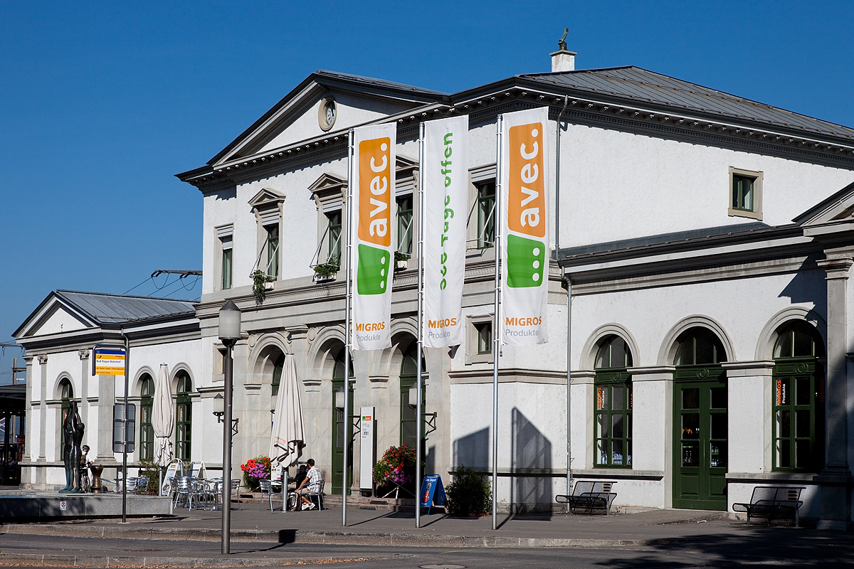 Bahnhof (1875) in Bad Ragaz (SG)